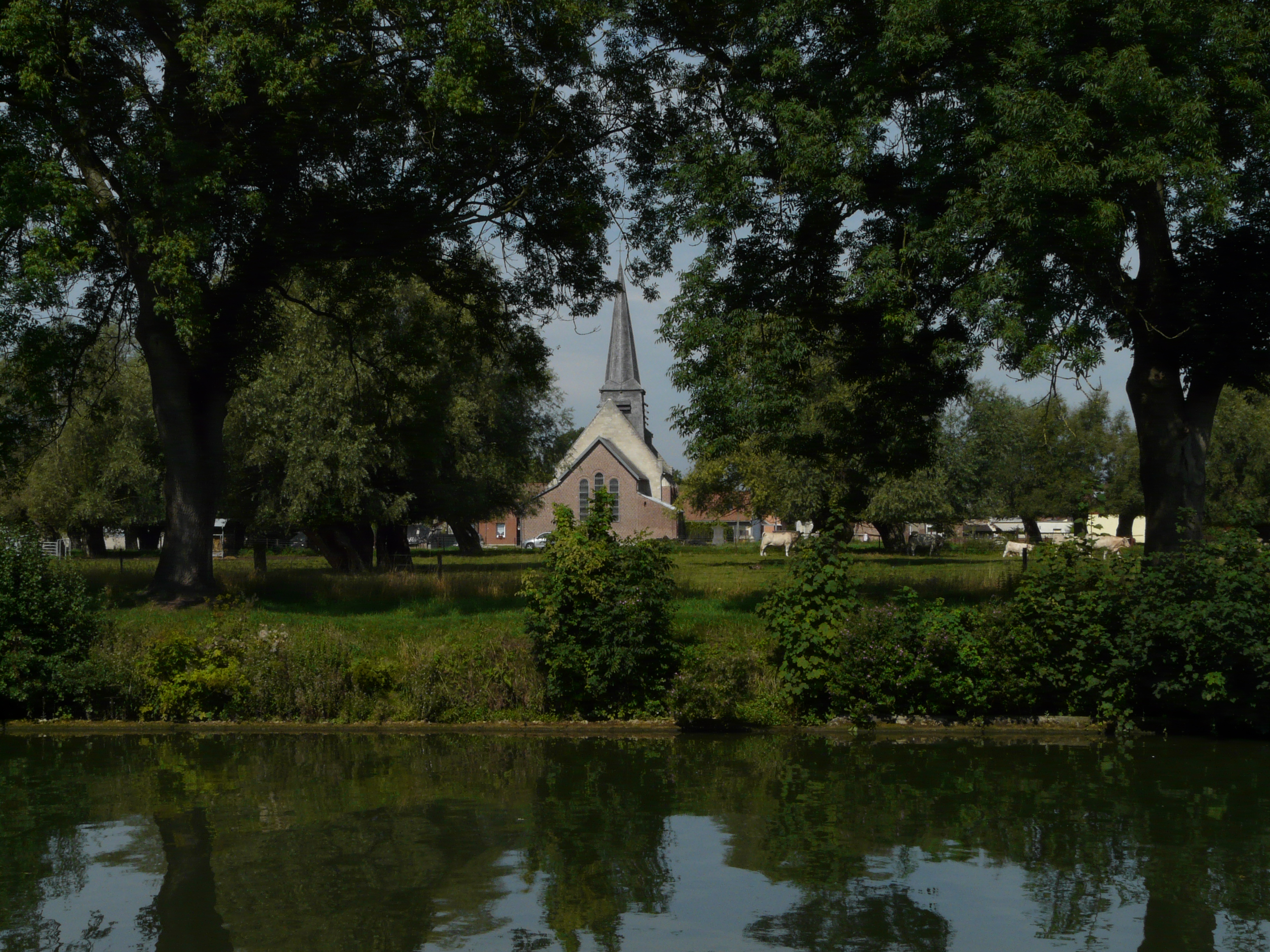 L'église de Ramillies (Nord, France) et le canal de l'Escaut